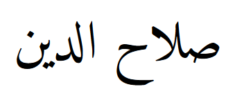 Салахуддин